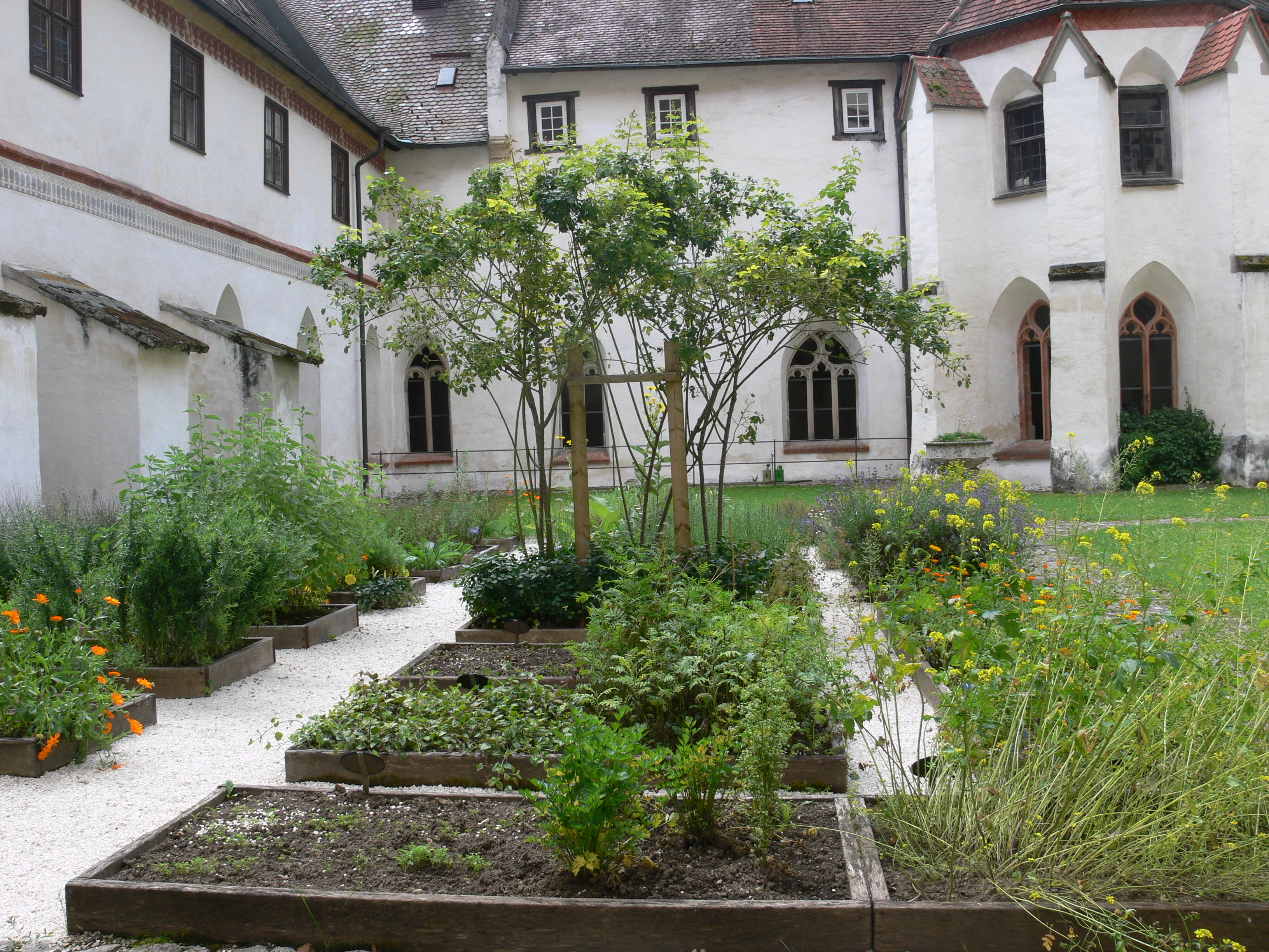 Kloster Blaubeuren, Kreuzgarten (Kräutergarten)